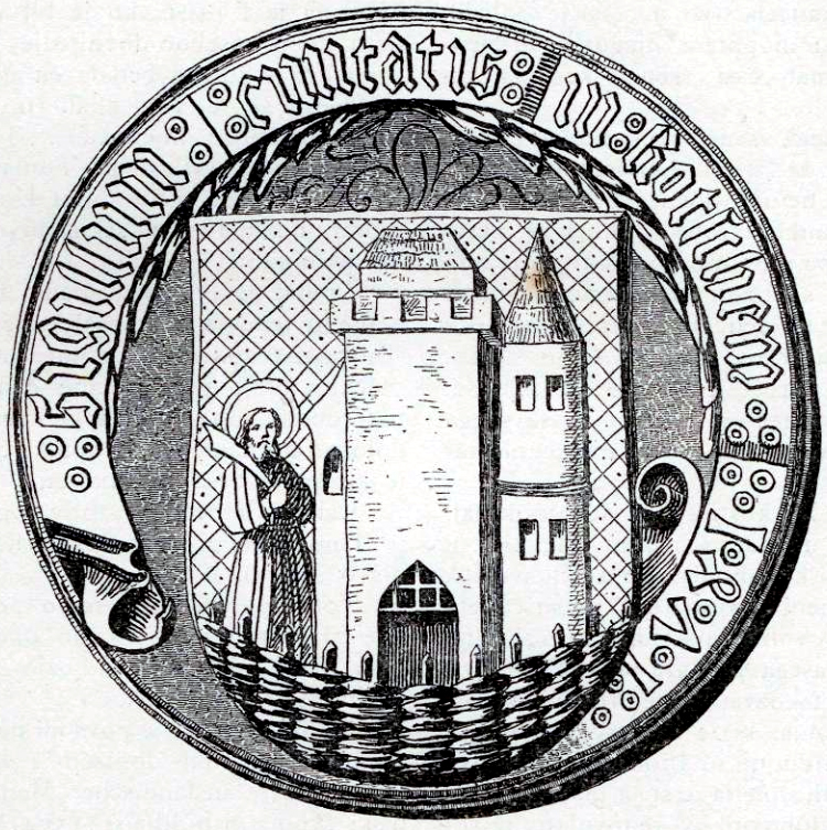 Grb mesta Kočevje.